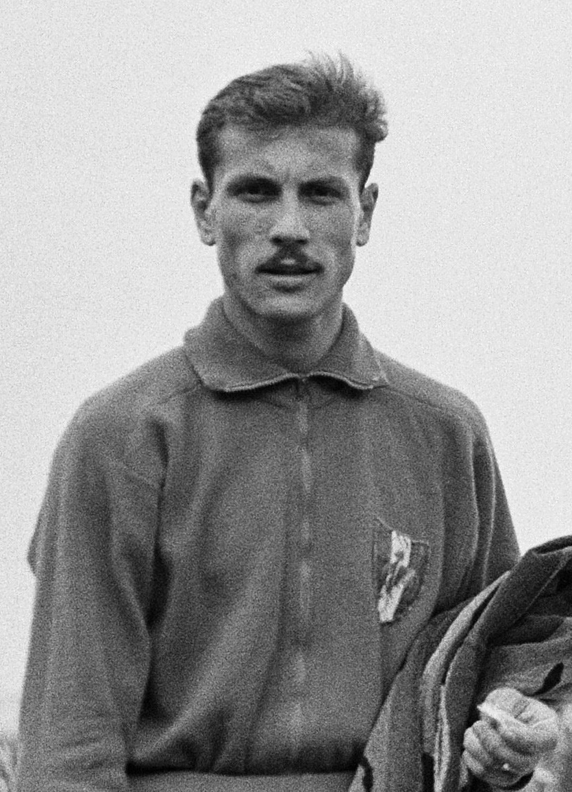 Zes Landen Atletiek in Enschede. Huldigingsceremonie 800 meter. Maurice Lurot )